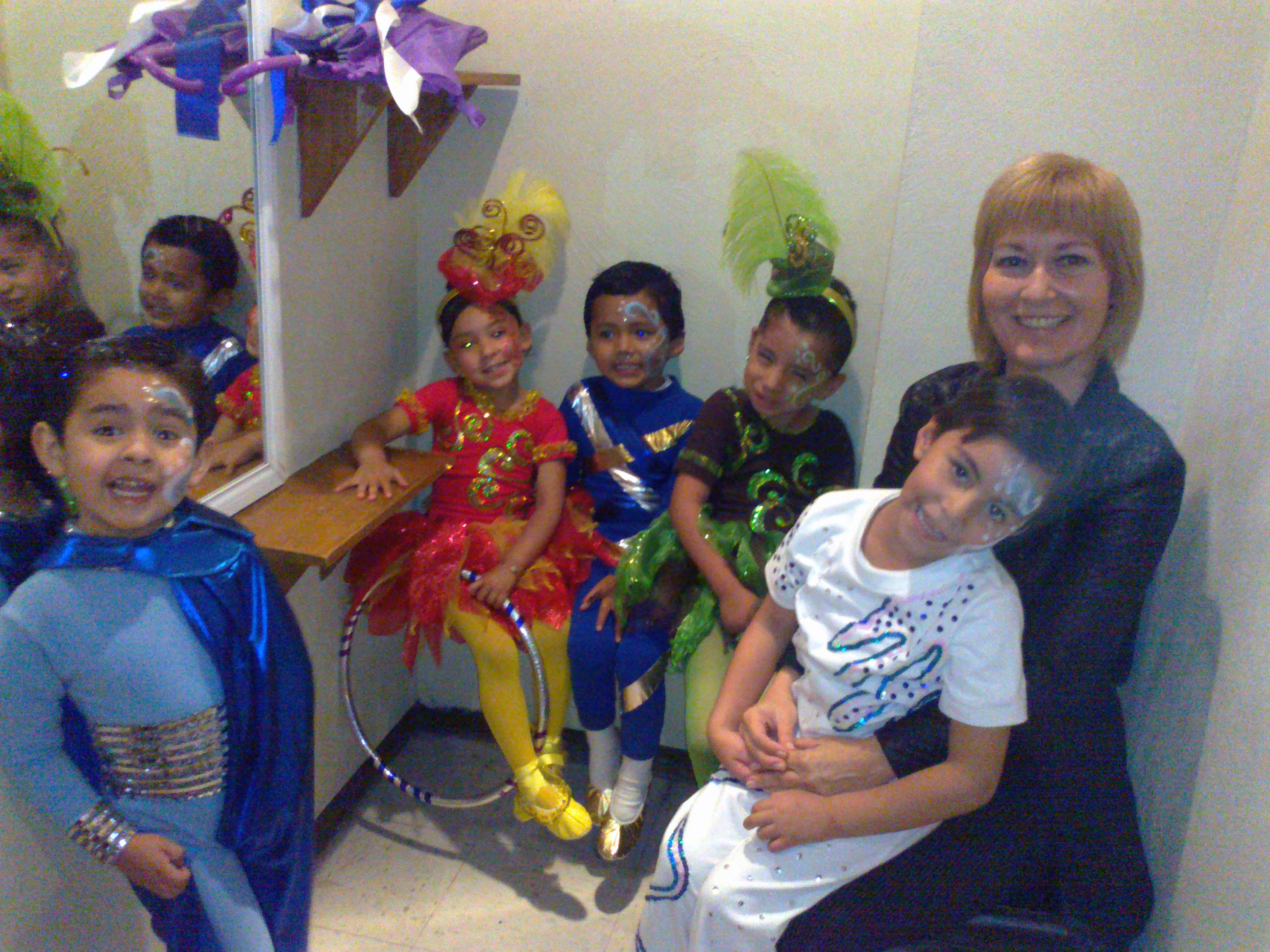 Diana López Moyal en el instituto